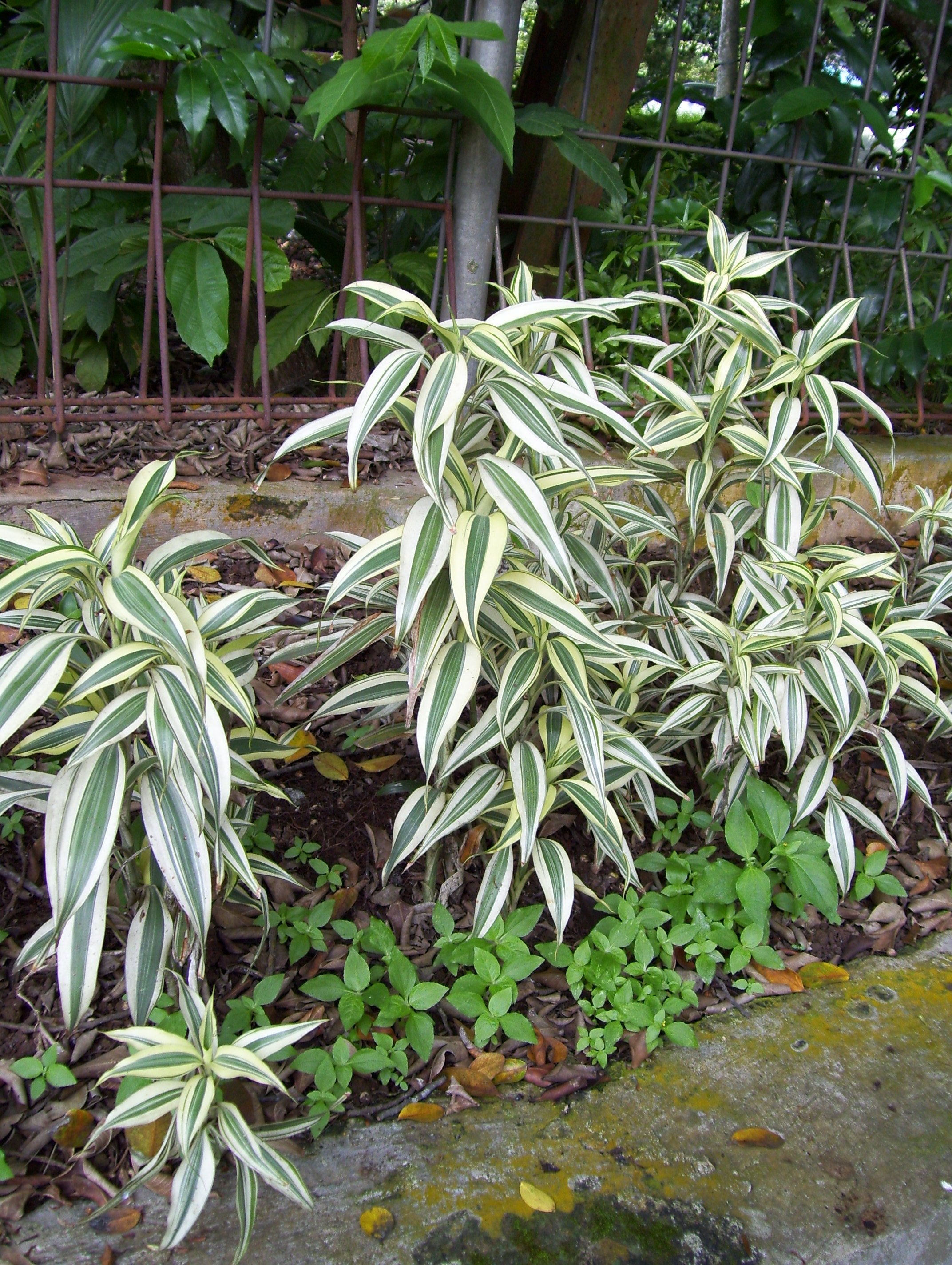 Dracaena sanderiana Cultivar 'Borinquensis'. Taken from Ragunan Zoo, Jakarta, Indonesia